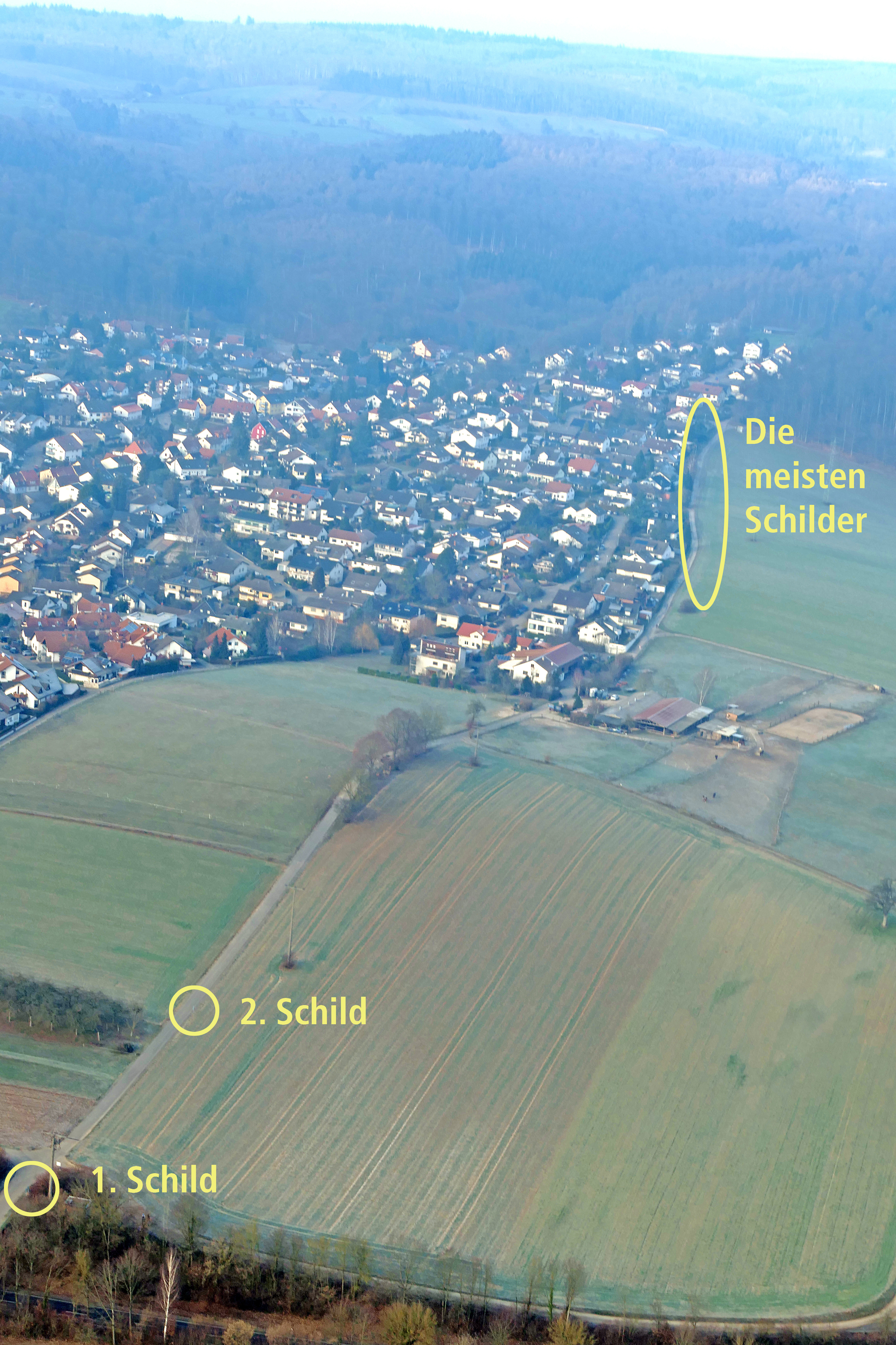 Der Evolutionsweg am östlichen Rande von Gauangelloch, einem Ortsteil von Leimen. Der Evolutionsweg am östlichen Rande von Gauangelloch ist etwas über 1 km lang; er wurde hier von einem Tragschrauber aus fotografiert. Die 19 Schilder haben unterschiedliche Abstände, die den zeitlichen Abstand der dargestellten evolutionären Ereignisse repräsentieren. Mit Kreisen gekennzeichnet sind die Standorte des 1. sowie des 2. Schildes sowie die Standorte der meisten Schilde, die sich zum Ende des Evolutionswegs am oberen Waldrand hin kumulieren.